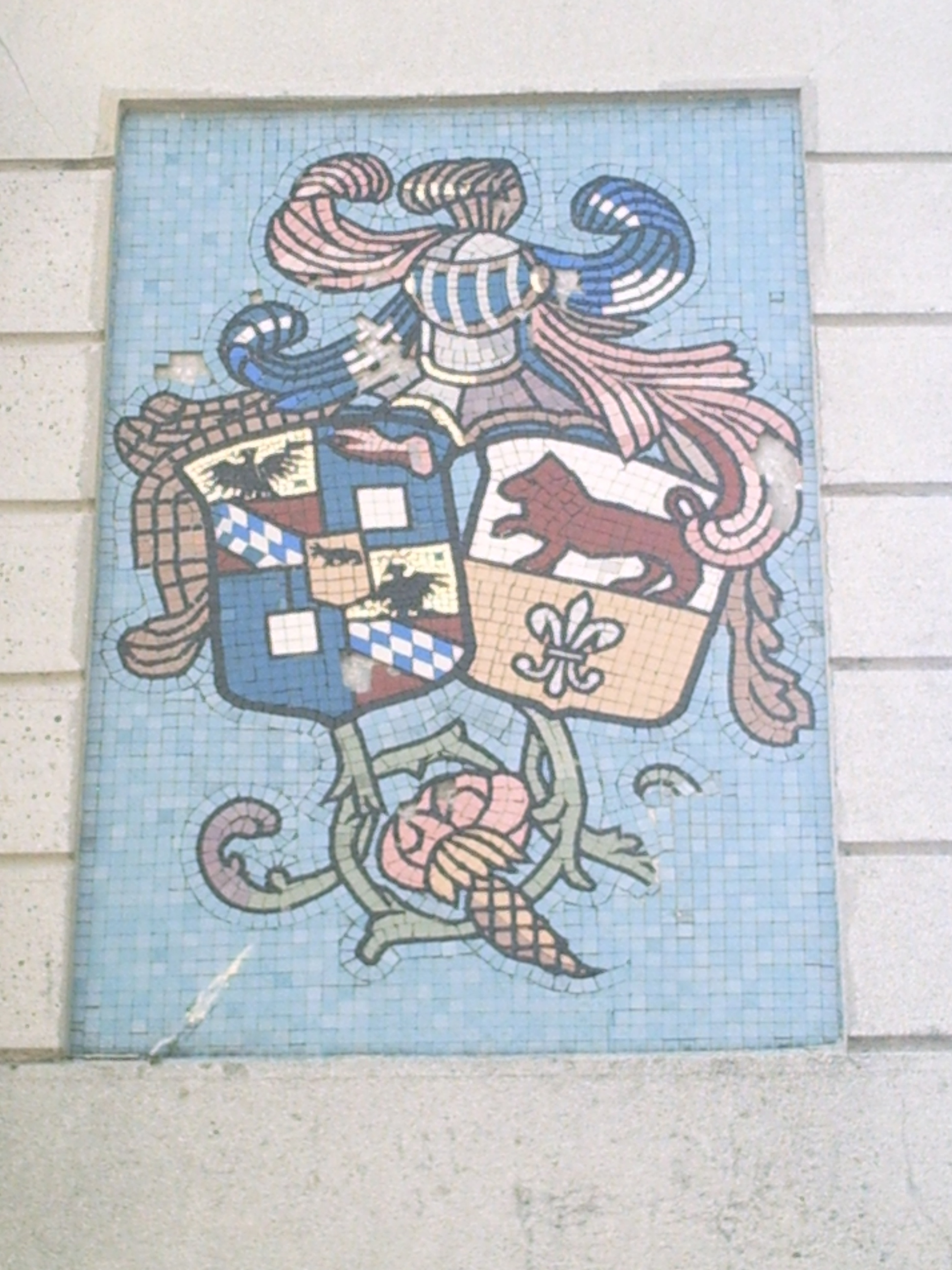 Stemmi delle famiglie Lampugnani (a sinistra) e Gajo (a destra); particolare della "Cappella ai Caduti della Patria" nel cimitero di Parabiago.